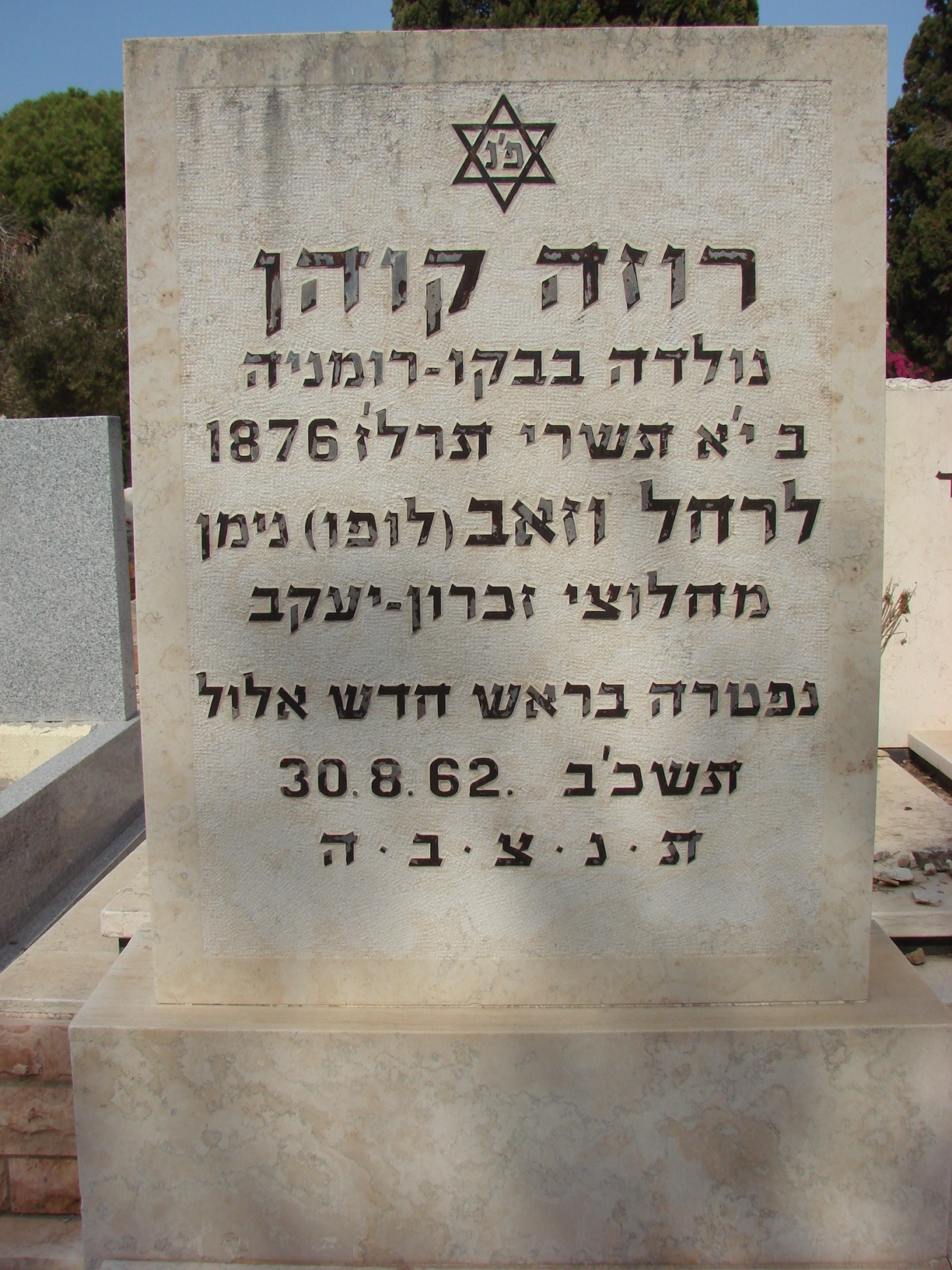 קברה של רוזה קוהן ניימן בזכרון יעקב